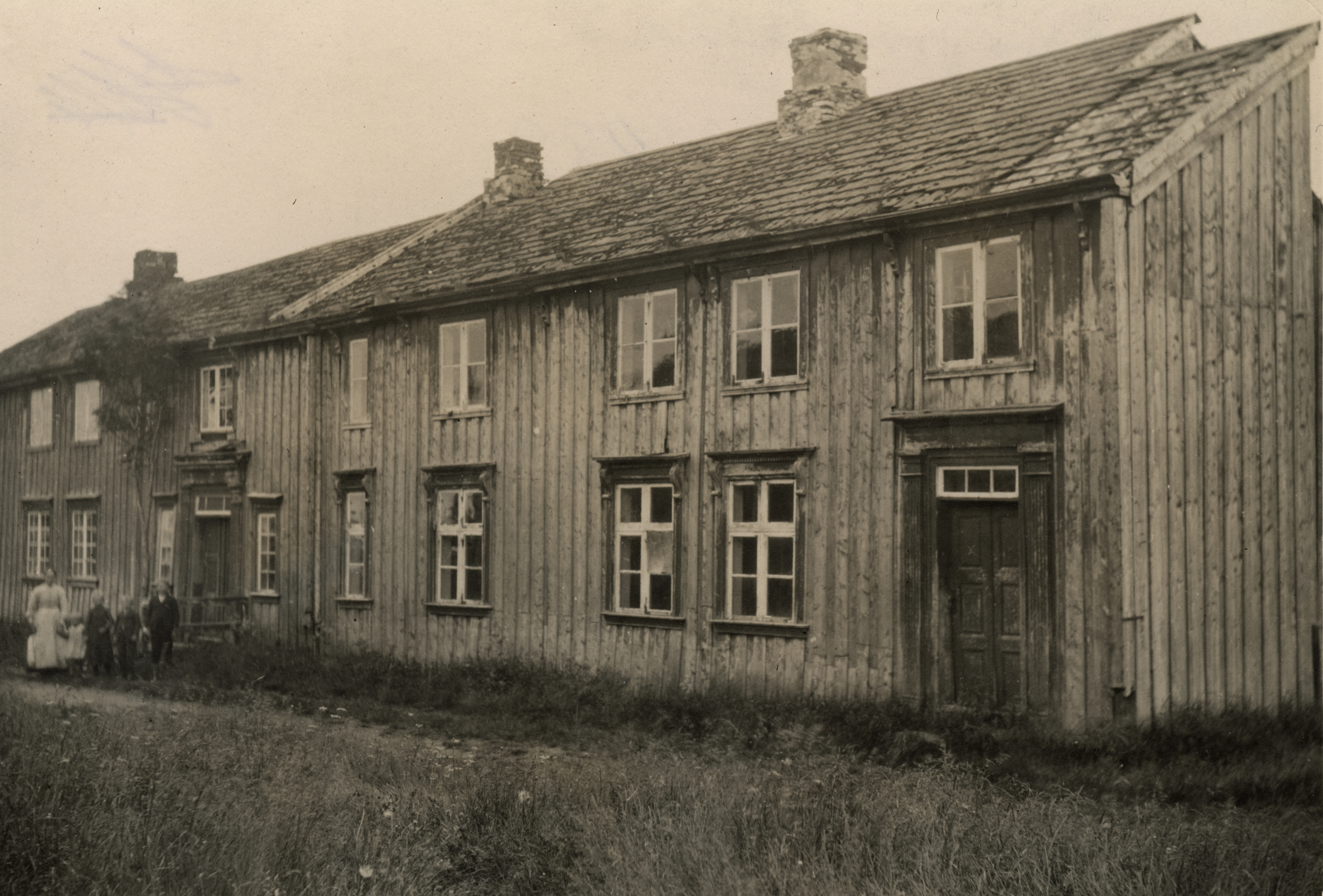 Nærøy gamle prestegård i Nærøy, Nord-Trøndelag Fredet This image on crowdsourcing geotagging platform Fotodugnad